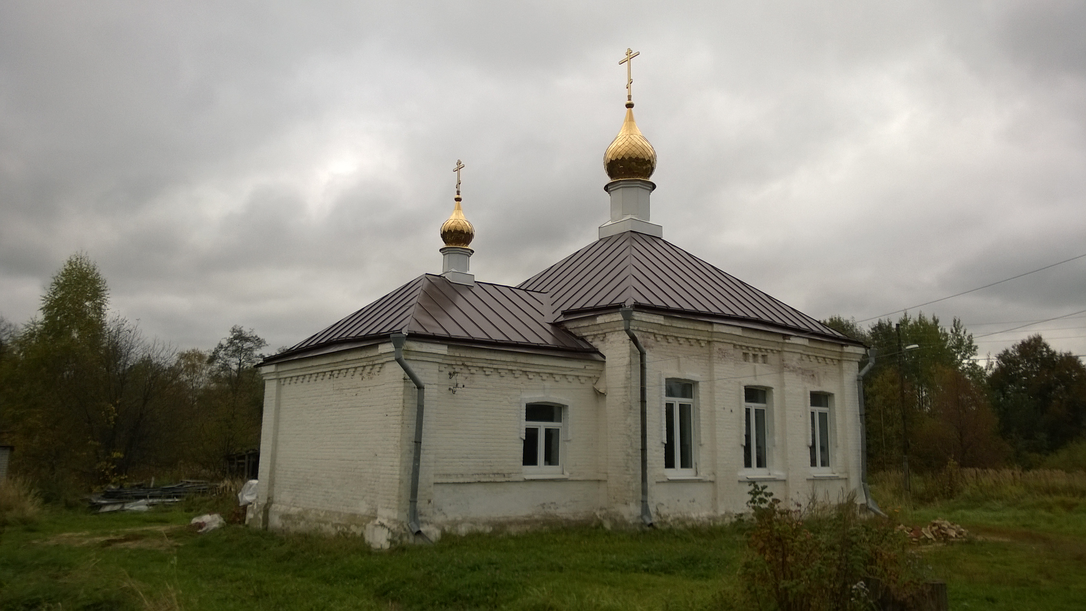 Церковь Троицы: Костино, Петушинский район, Владимирская область